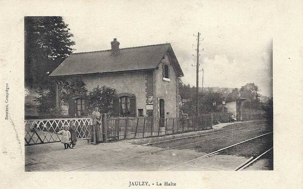 Le point d'arrêt de Jaulzy.